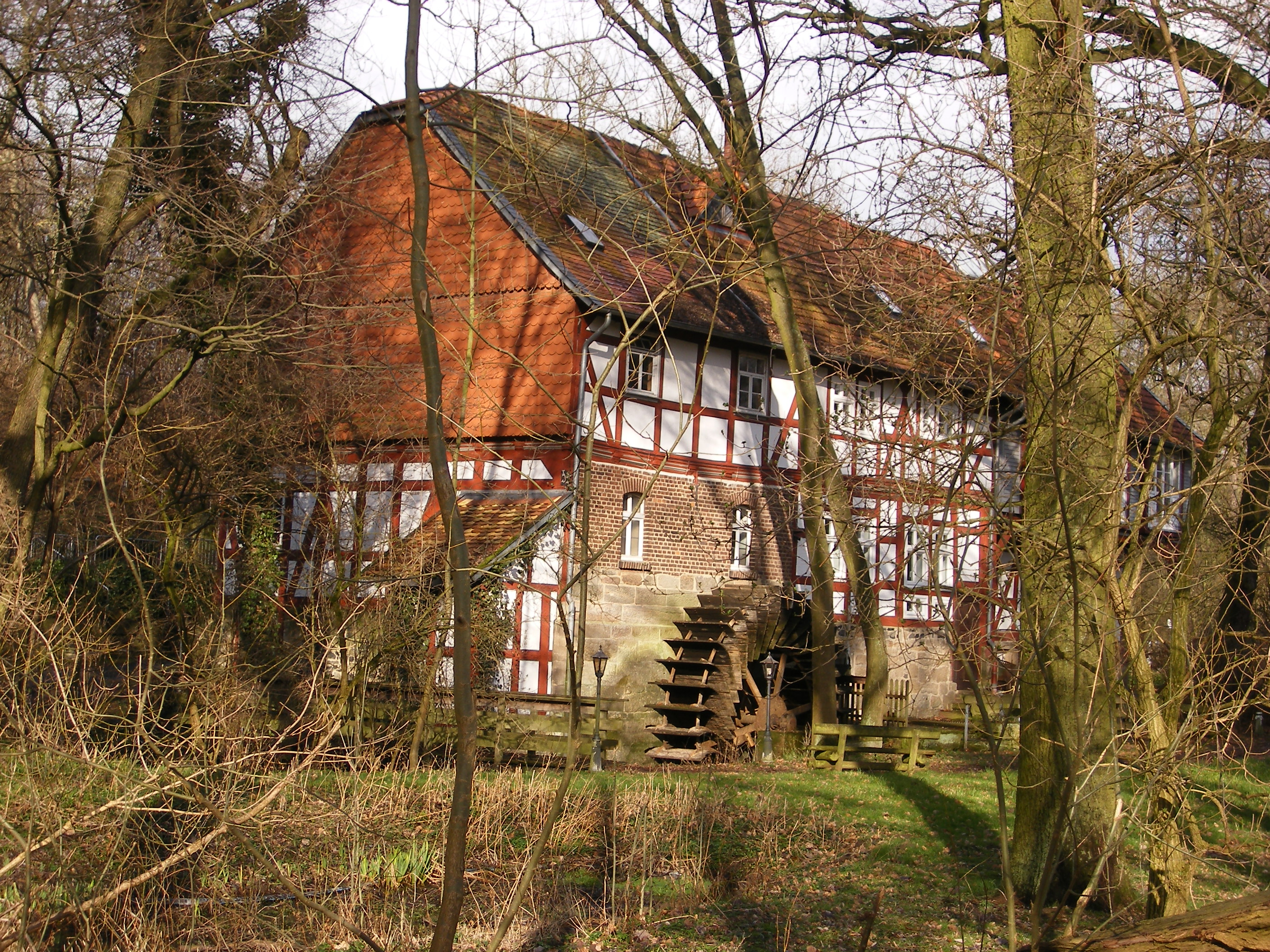 Blick über die Mühleninsel zur Hohlebachmühle